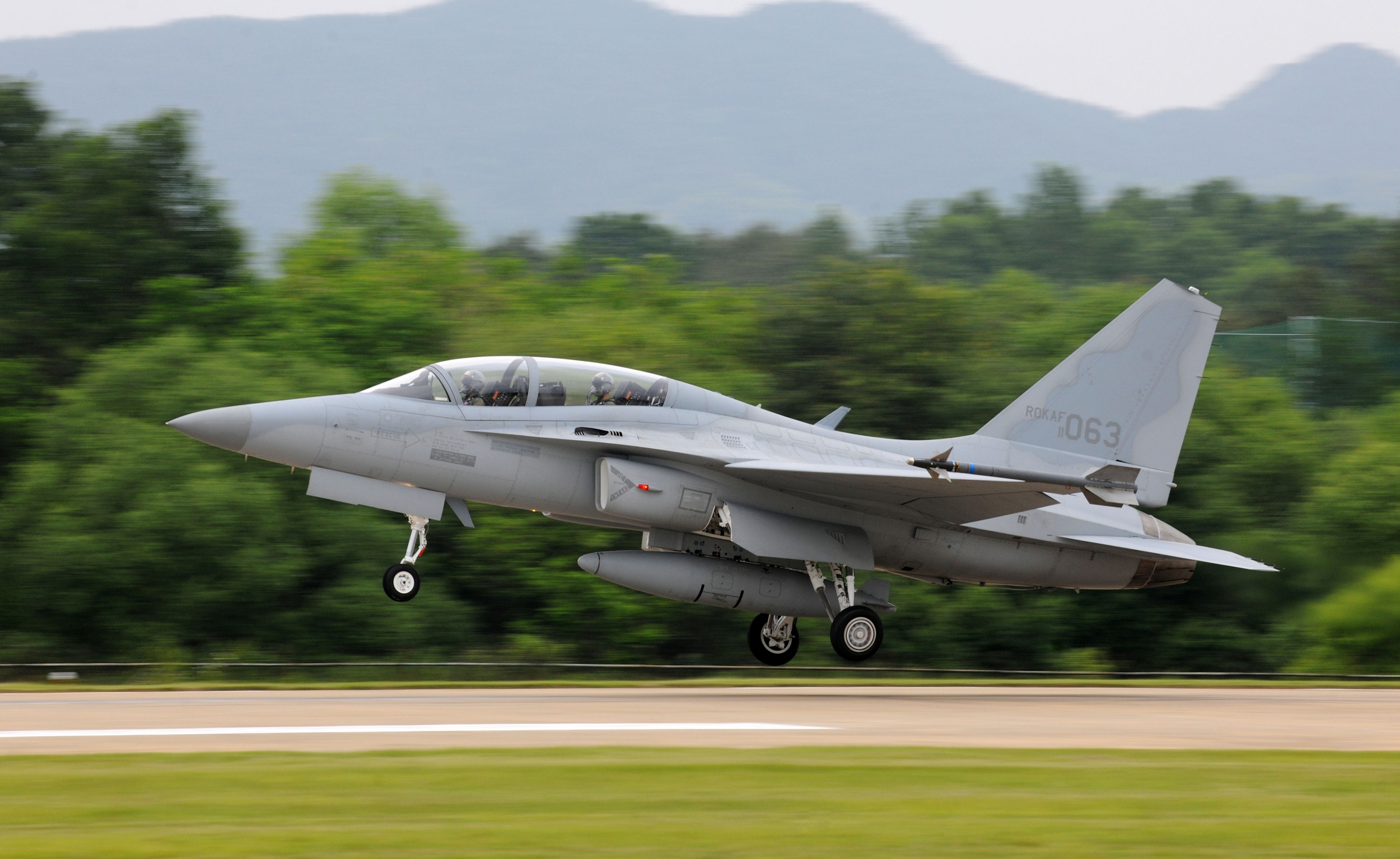 FA-50 공격기